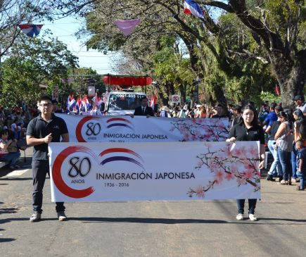 Jóvenes sansei desfilan en conmemoración del 80º aniversario de la inmigración japonesa al Paraguay.